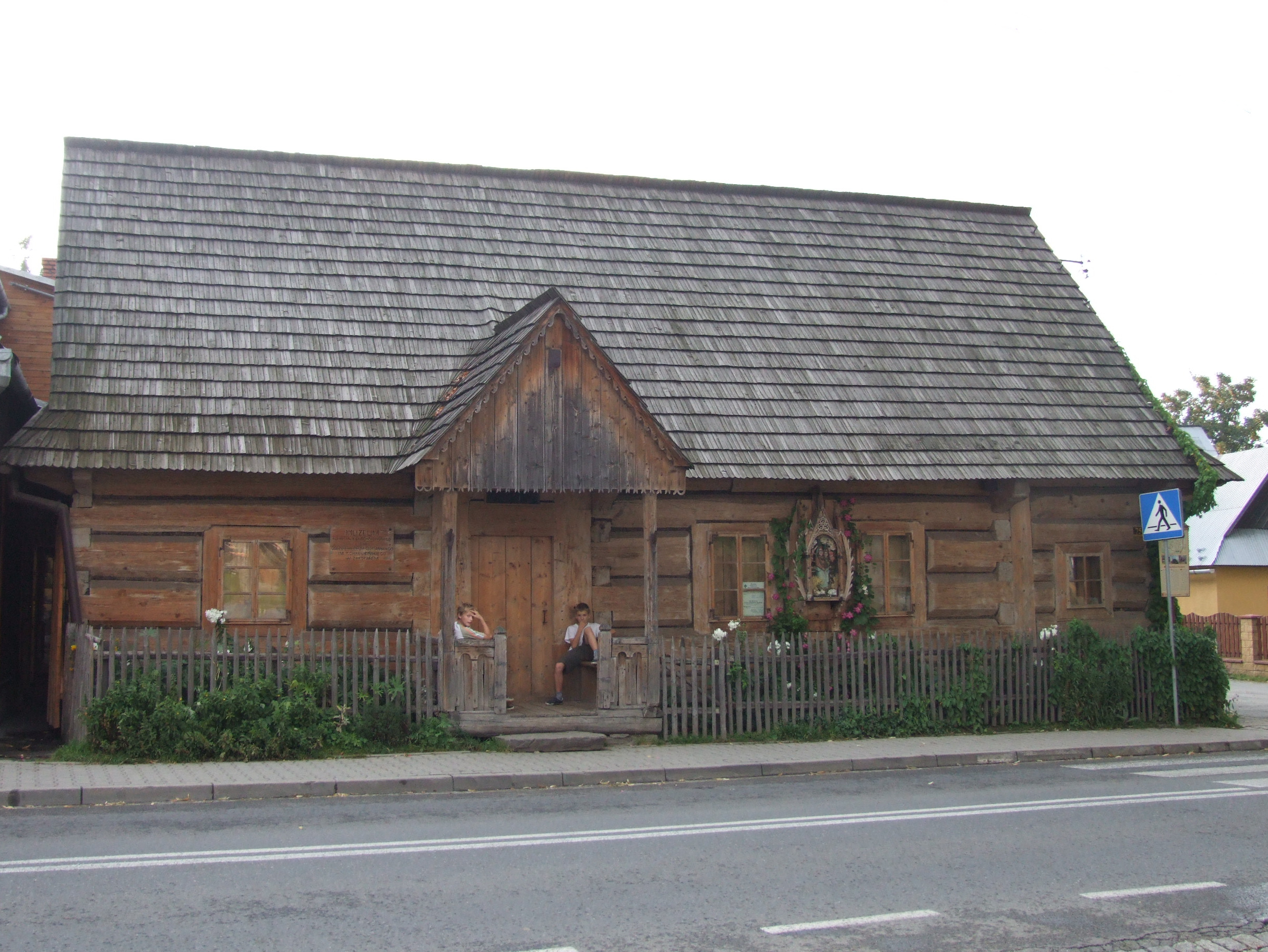 Muzeum Powstania Chochołowskiego w Chochołowie